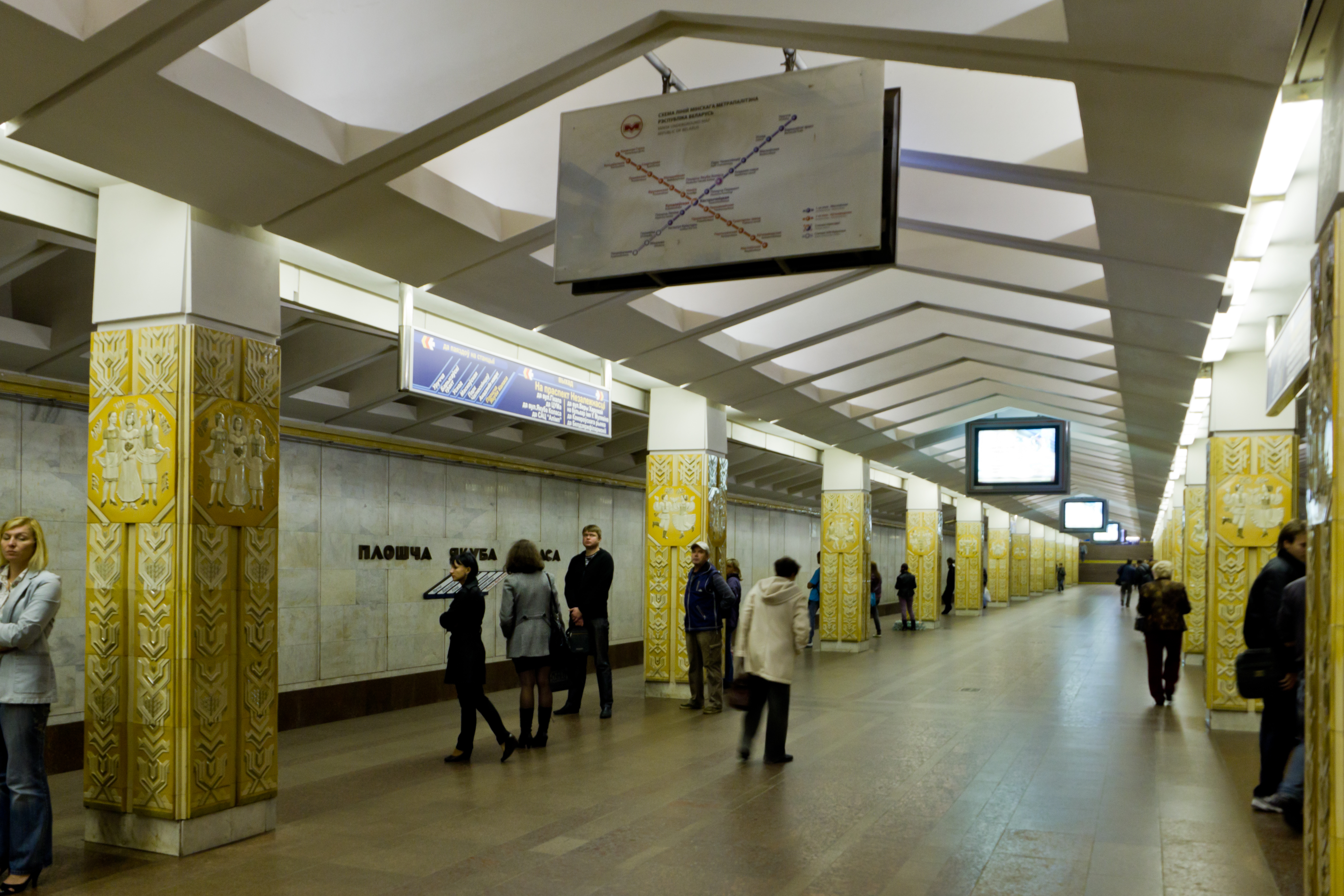 Станция метро «Площадь Якуба Коласа», Минск